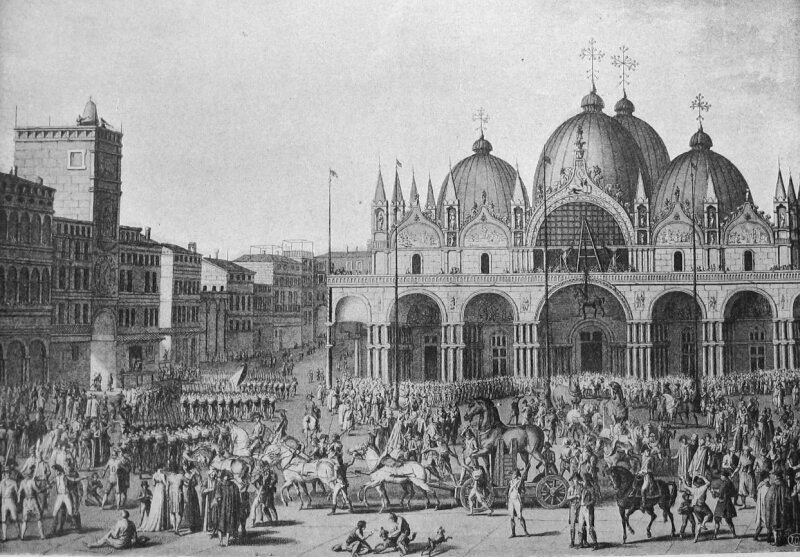 Wejście Francuzów do Wenecji (6 maja 1797); sztych Duplessis-Bertauxa.